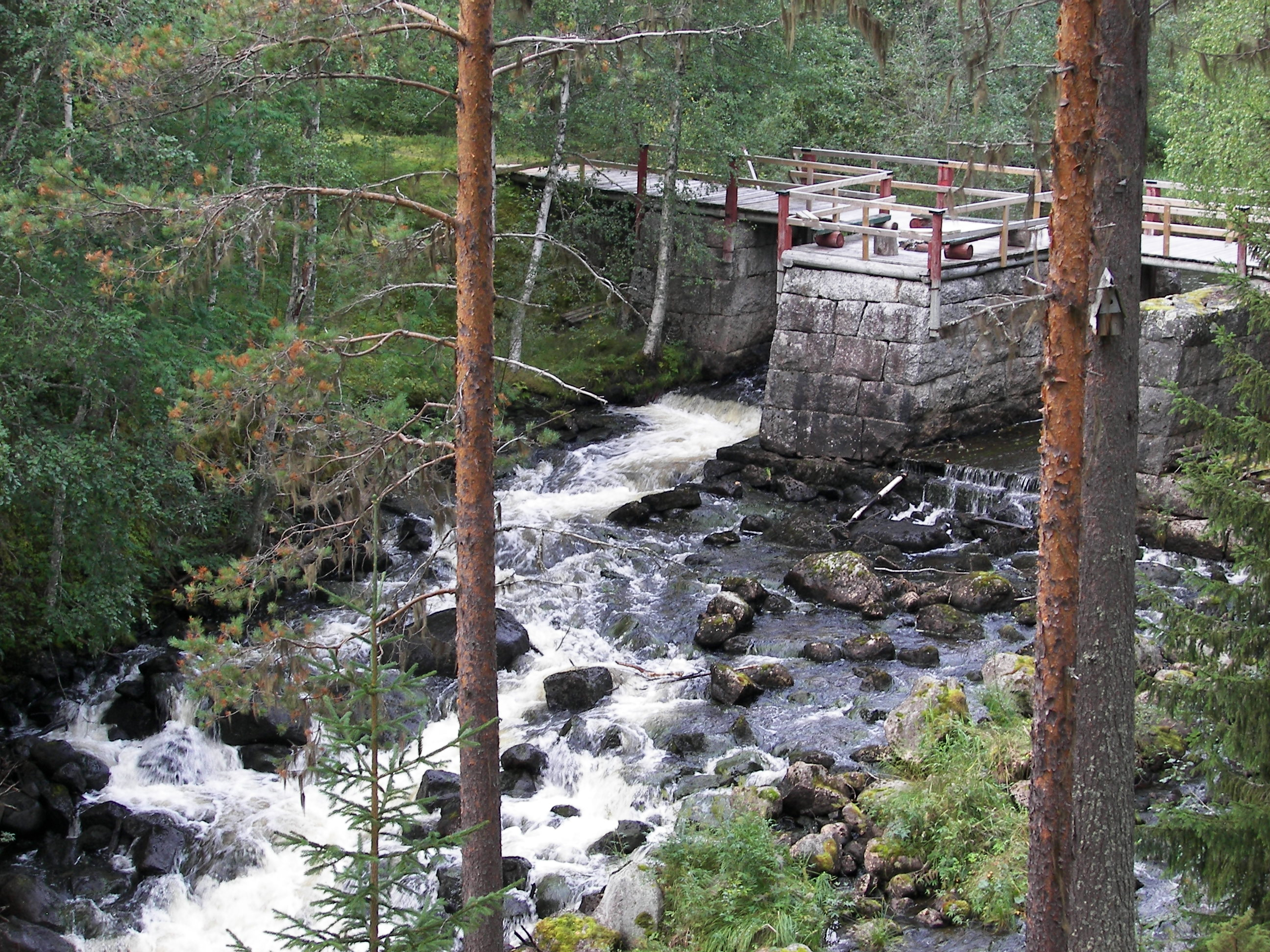 Rinnån vid Omsjö nordväst om Junselevallen